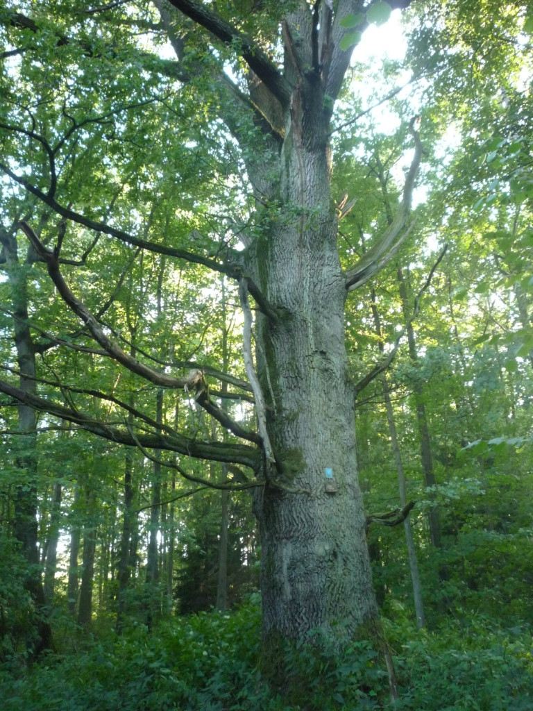 Pomnikowy dąb w Dworku